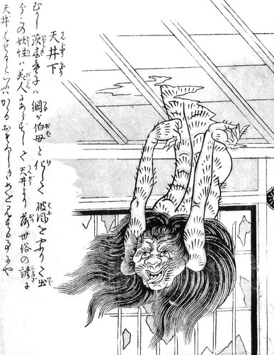 Tenjōkudari (天井下) from the Konjaku Gazu Zoku Hyakki (今昔画図続百鬼)